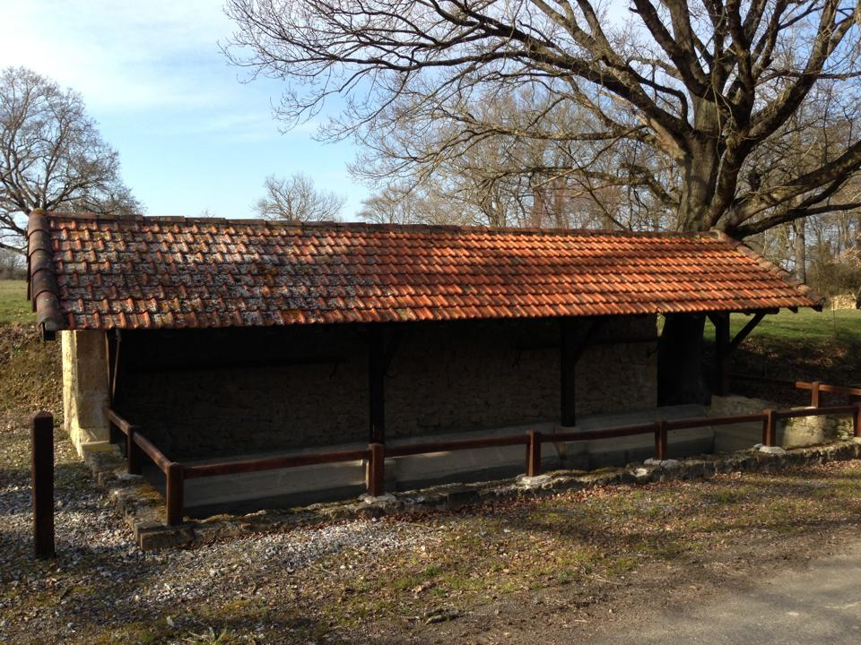 Le lavoir de Ladevèze Rivière en hiver (rénové récemment)